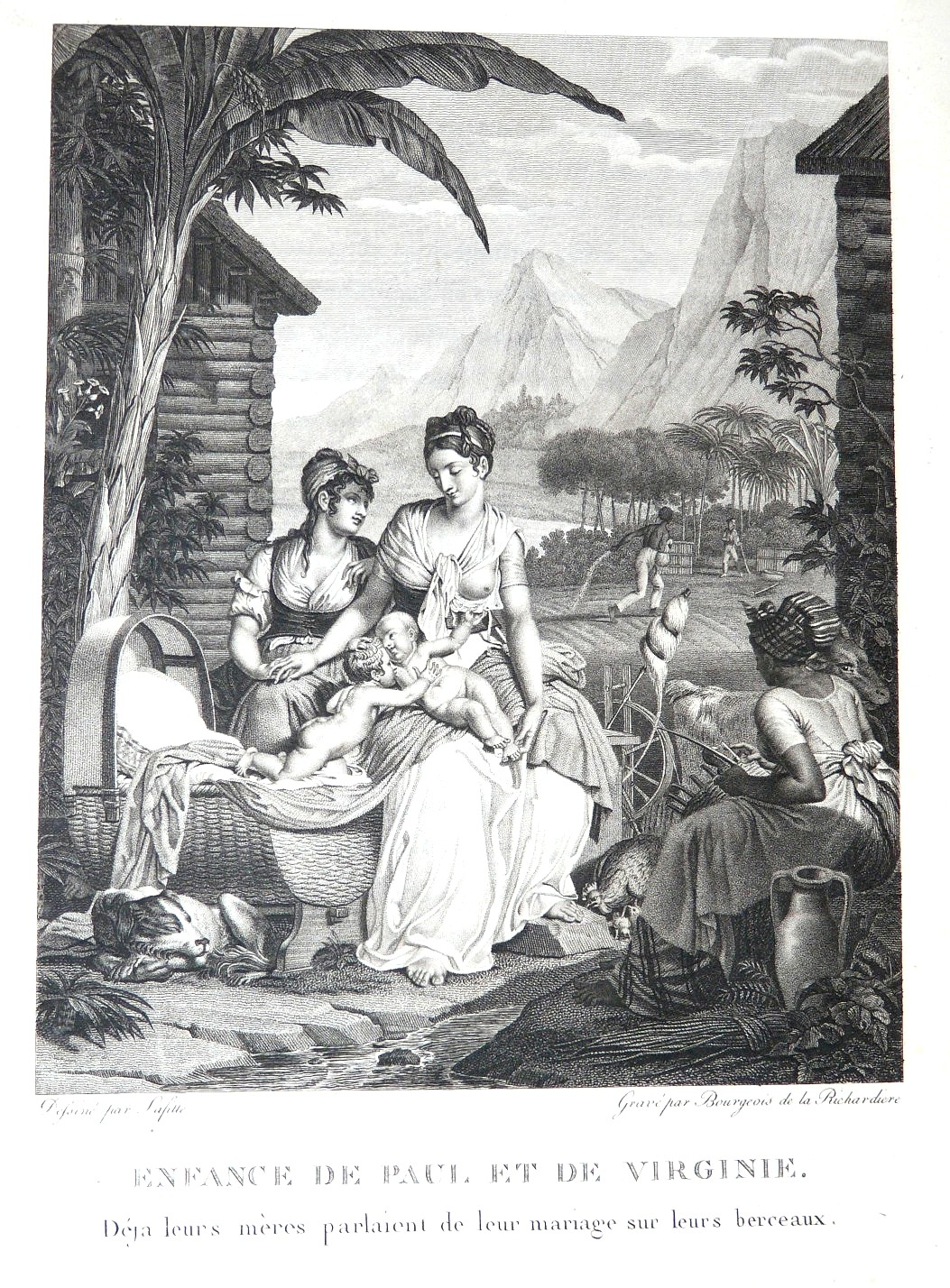 Gravure de Paul et Virginie, édition Didot de 1806, dessin de Louis Lafitte.